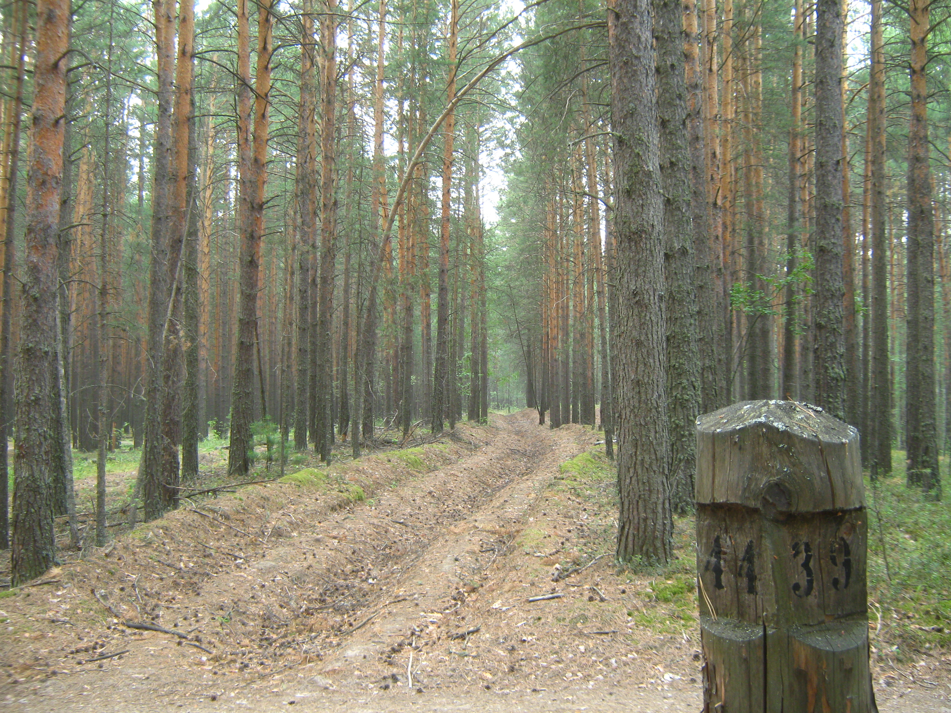 Темерчинское урочище - квартальный столб и противопожарный ров. Кварталы 38, 39, 43, 44.